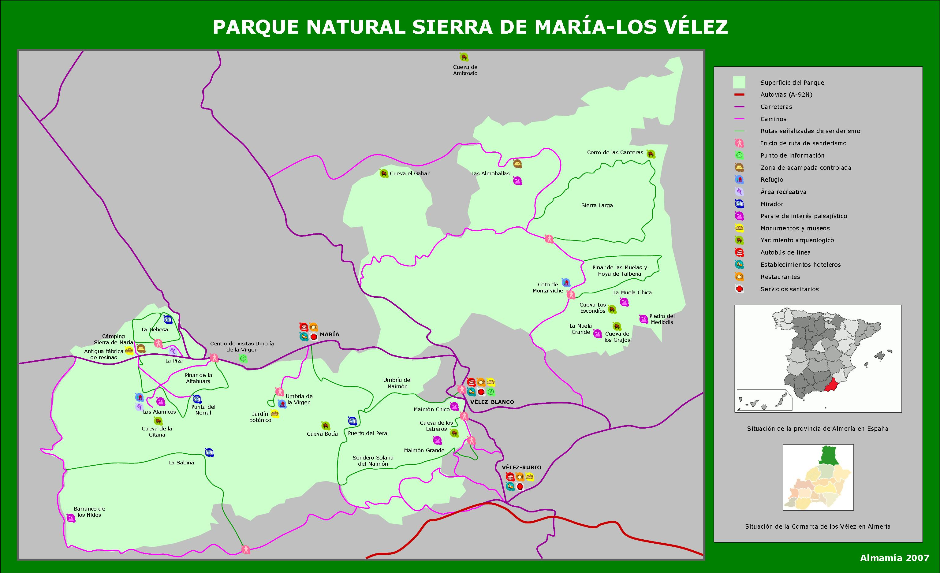 Croquis del Parque Natural Sierra de María-Los Vélez en Almería